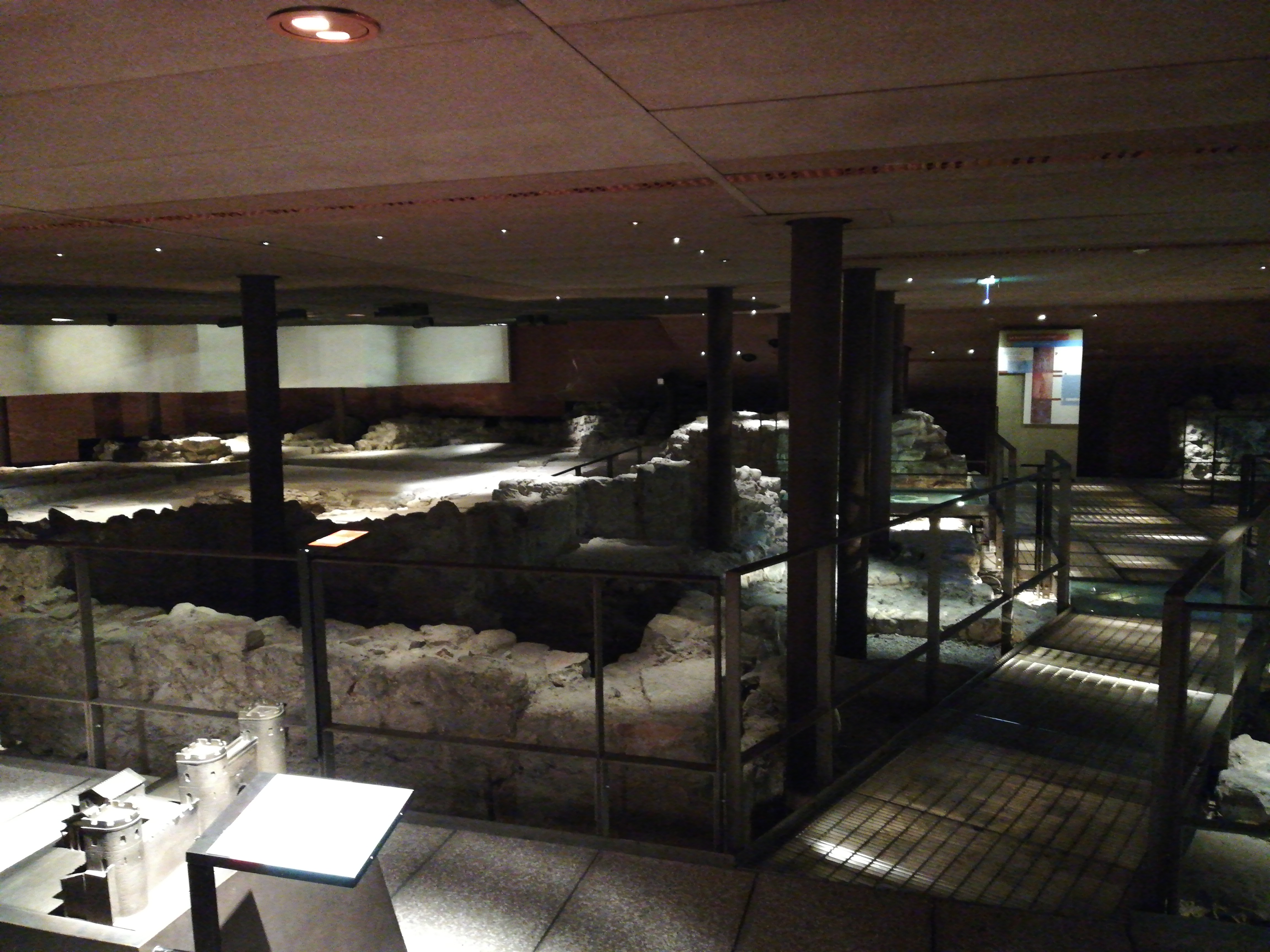 Baptistère du groupe Cathédral de Grenoble (France), sous le Musée de l'Ancien Evêché.